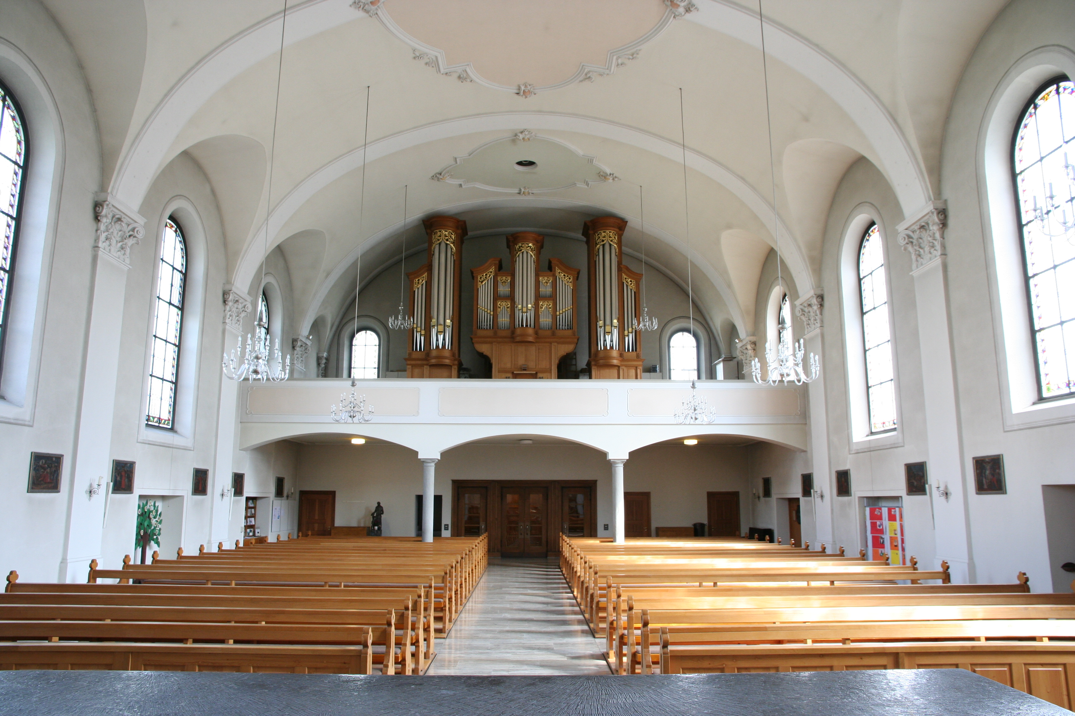 Römisch-katholische Pfarrkirche St. Felix und Regula Thalwil, Empore